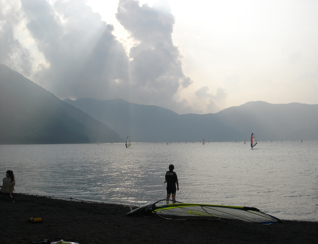 Nogle timers kørsel udenfor Tokyo ligger Lake Motosu, der er et yndet sted for surfere. Fra den ene side af søen er der udsigt til Mount Fuji - hvis altså vejret tillader det. I klart vejr vil den flittige forbruger af Yen kunne genkende billedet på 1000-yen-sedlerne af netop Mount Fuji, der er taget fra breden af denne sø.